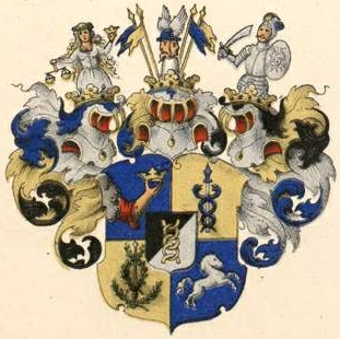 Schlippenbach-Sköfde suguvõsa krahvivapp